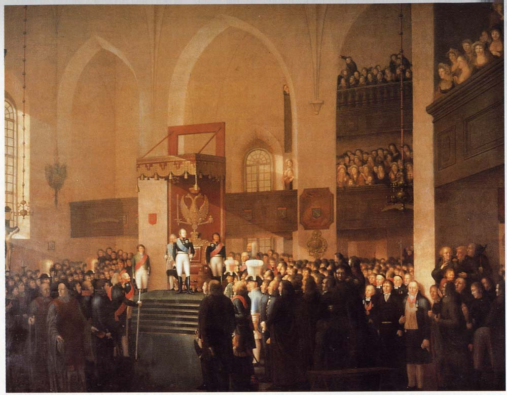 Tsar Alexander I opens the Diet of Porvoo 1809label QS:Lru,"Боргоский сейм" label QS:Len,"Tsar Alexander I opens the Diet of Porvoo 1809" label QS:Lfi,"Porvoon valtiopäivien avajaiset 1809"